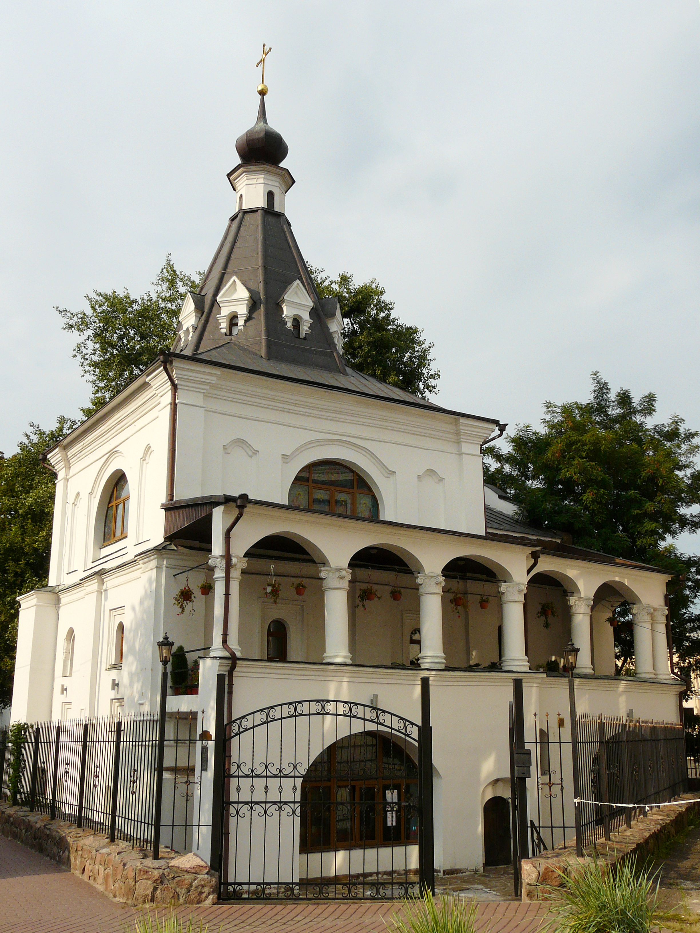 Дзвіниця церкви Миколи Доброго, Київ, Покровська вул., 6